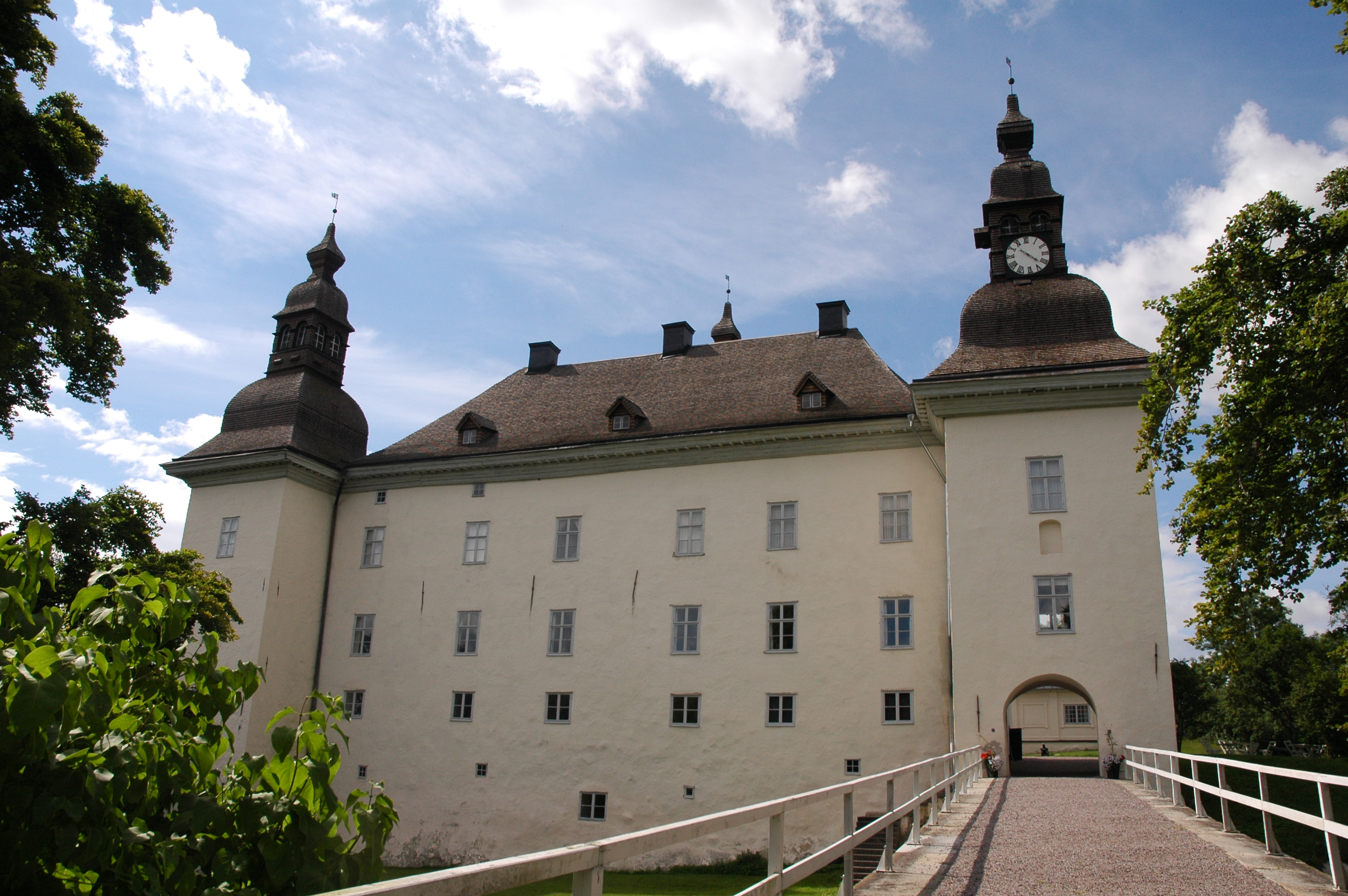 Huvudingången till Ekenäs slott. Bild tagen 2007-07-25.